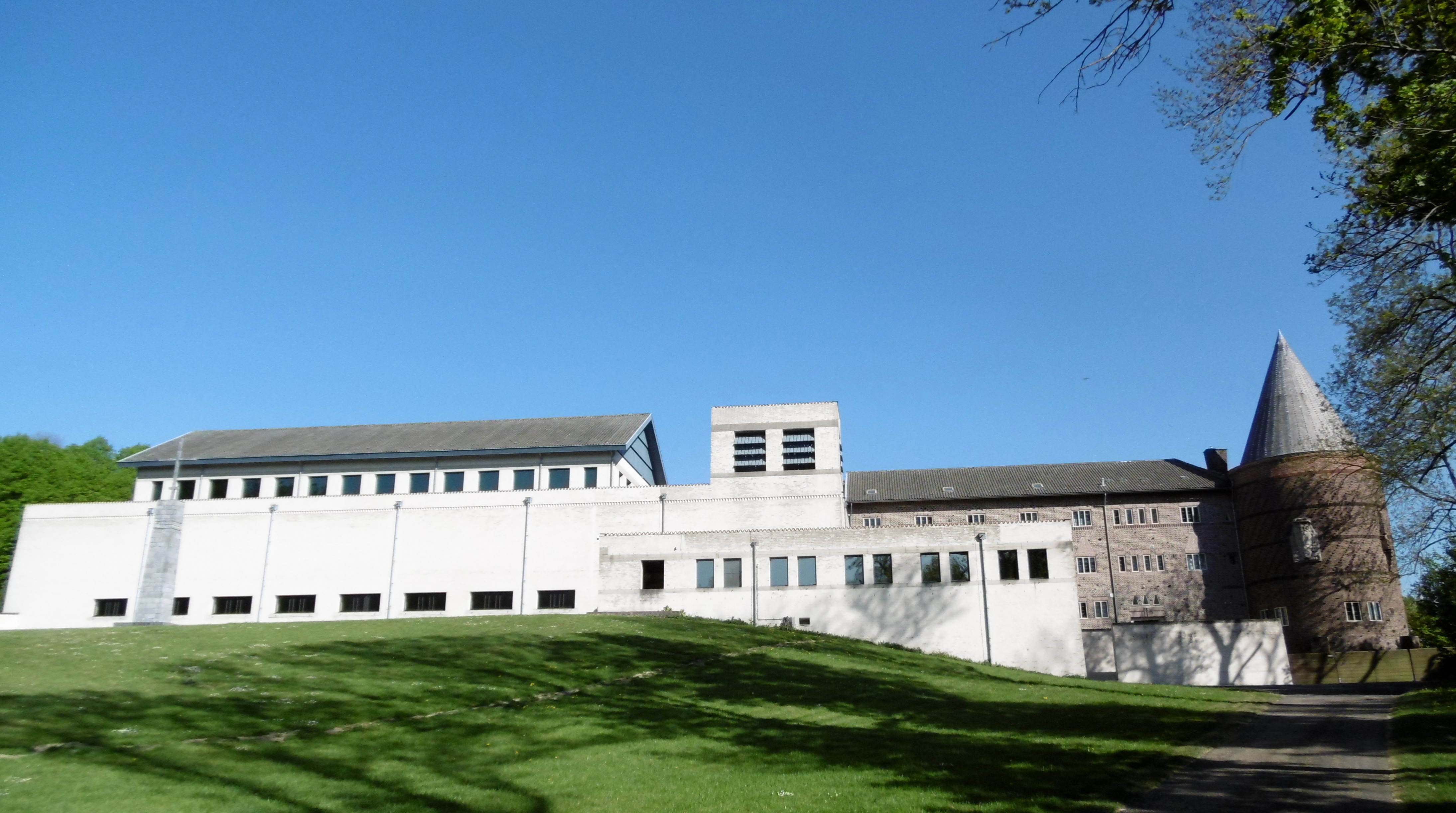 Seitenansicht Benedictusabtei Vaals-Mamelis